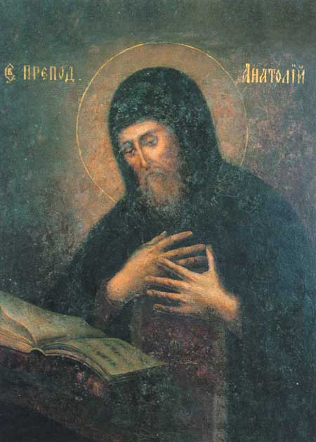 Saint Anatolius (Anatoliy) the Recluse of Kyiv Caves Анатолій затвірник. Ближні печери. - XII ст. Чернець Печерського монастиря. Преподобний. Пам'ять 11 жовтня і 16 липня. Біографічні дані невідомі. Його мощі спочивають у Ближніх печерах.